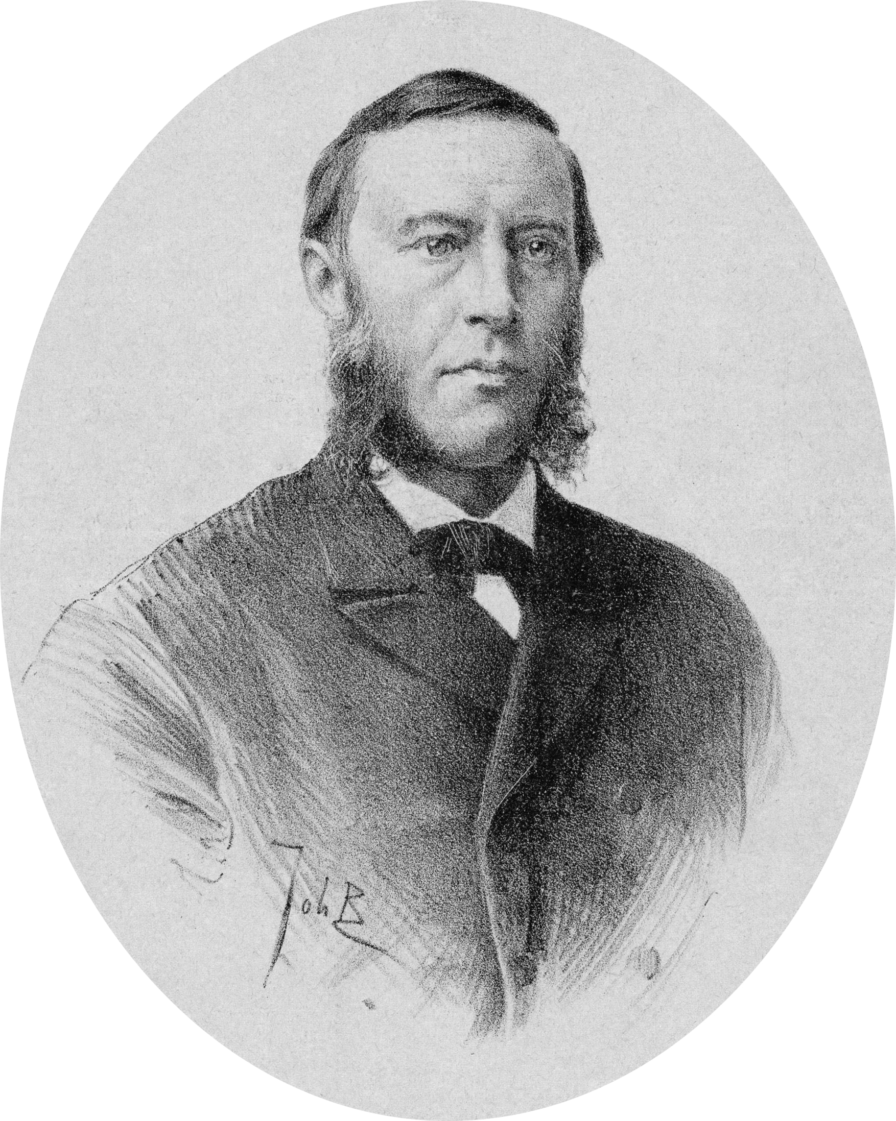 Sjoerd Anne Vening Meinesz (1833-1909) Burgemeester van Amsterdam van 1891-1901. Bijvoegsel bij De Amsterdammer van 27 september 1891.